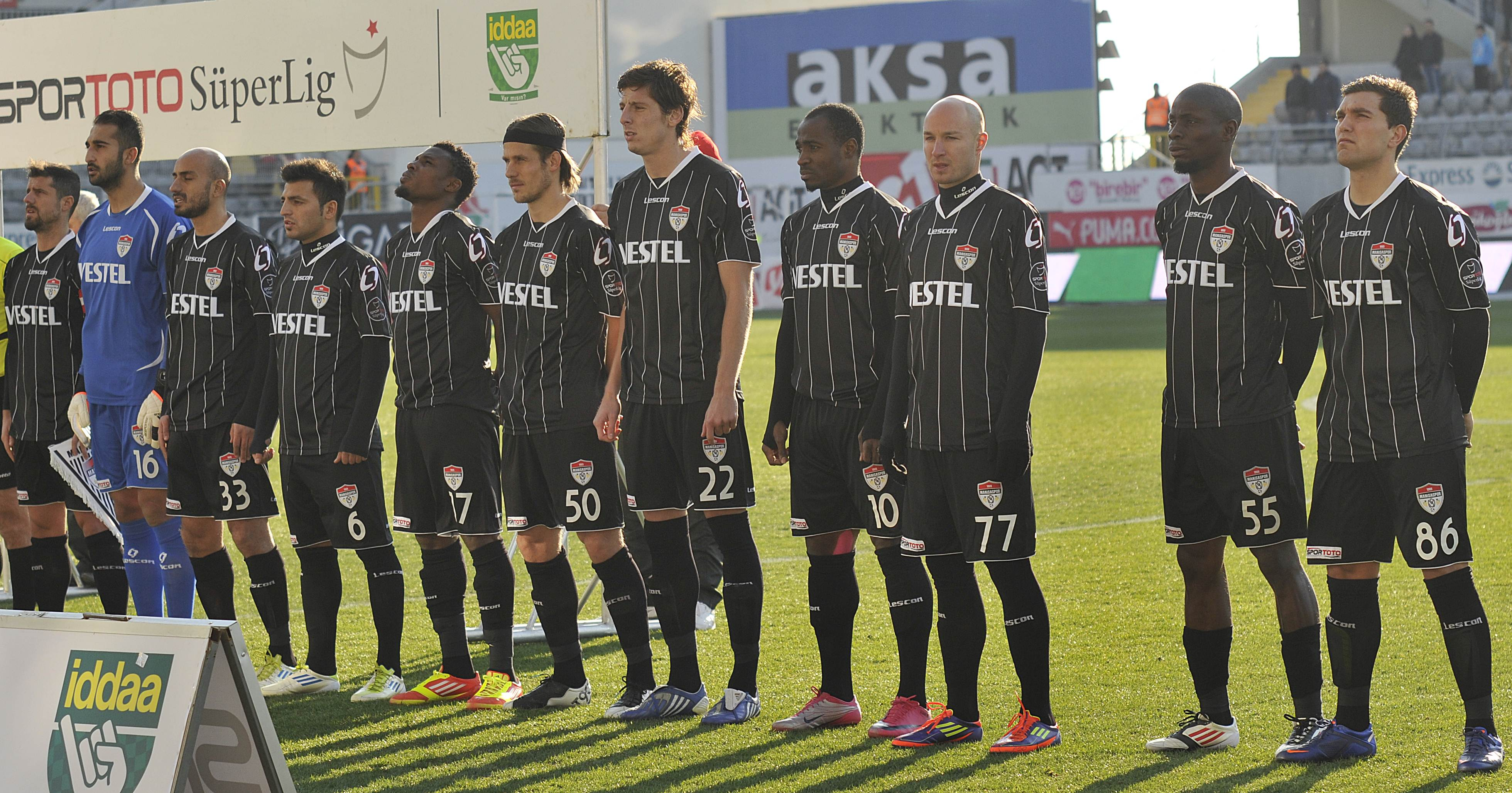 Manisaspor - Antalyaspor maçı takım kadrosu